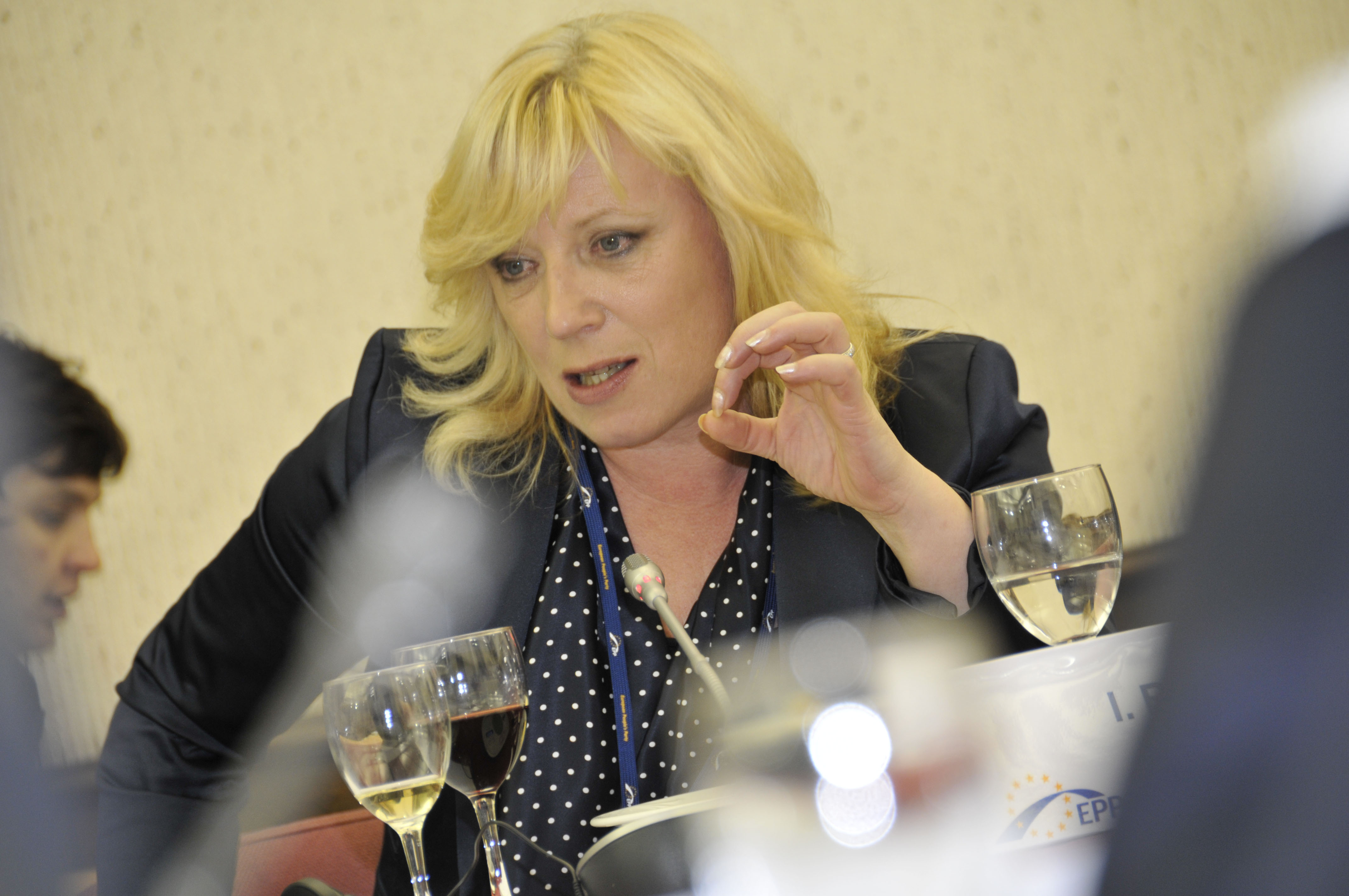 EPP_summit_468